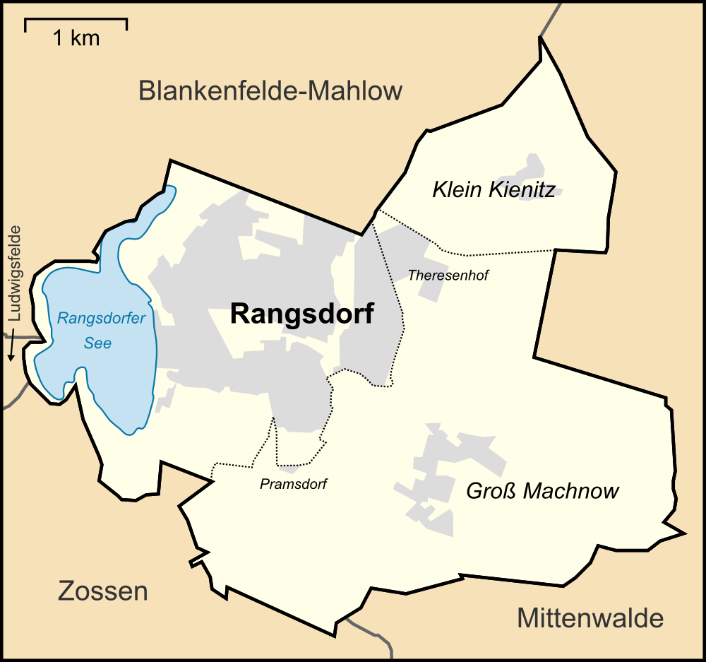 Karte der Ortsteile und Nachbargemeinden der Gemeinde Rangsdorf.